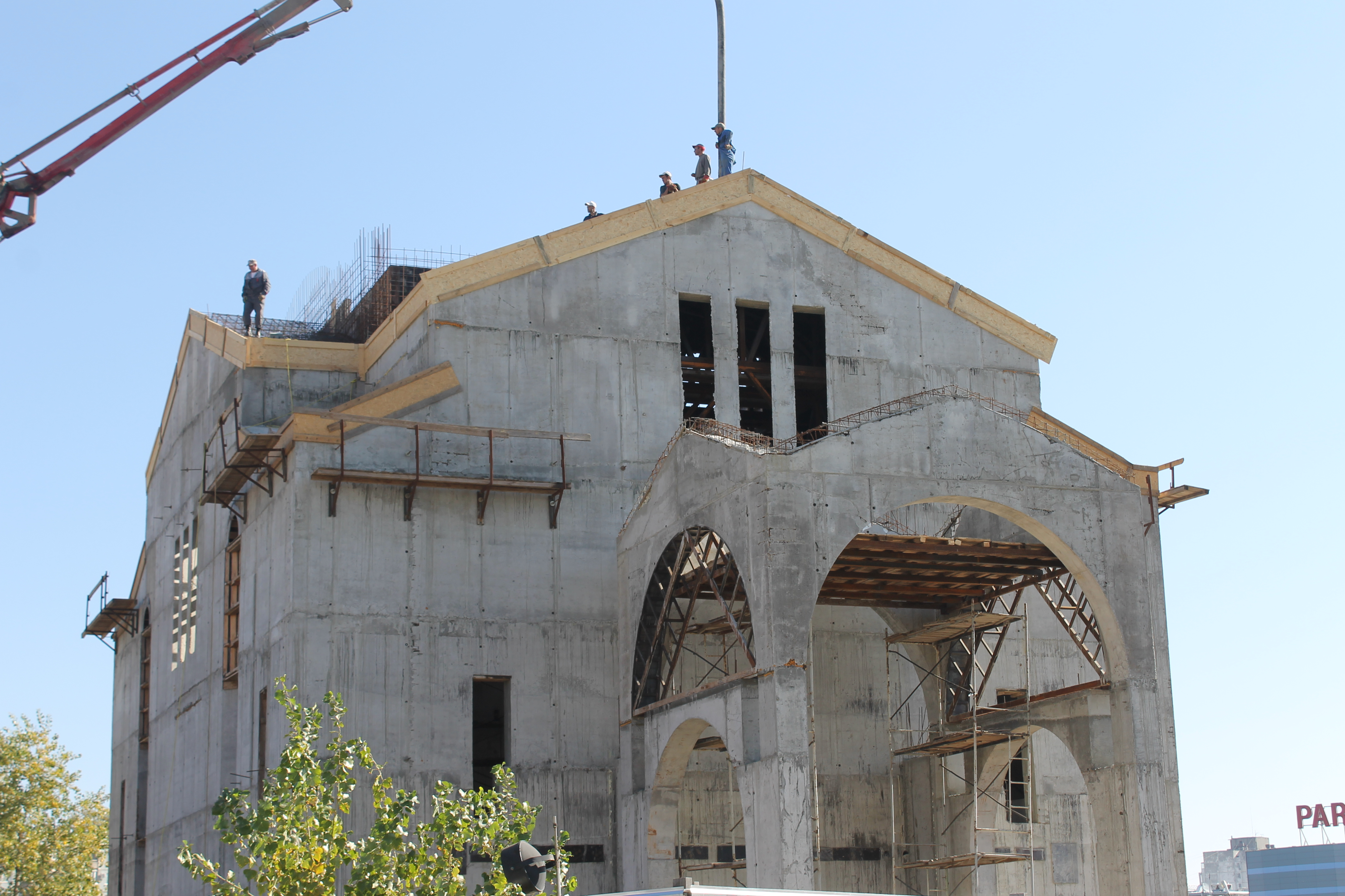 Строительство храма, октябрь 2014 г.